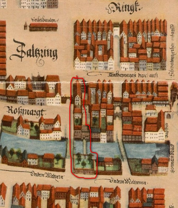 Plan Wrocławia - fragment z zaznaczeniem posesji pałacu Rybischów, aksonometryczny plan Wrocławia z 1562, kopia Partscha z 1826 r.